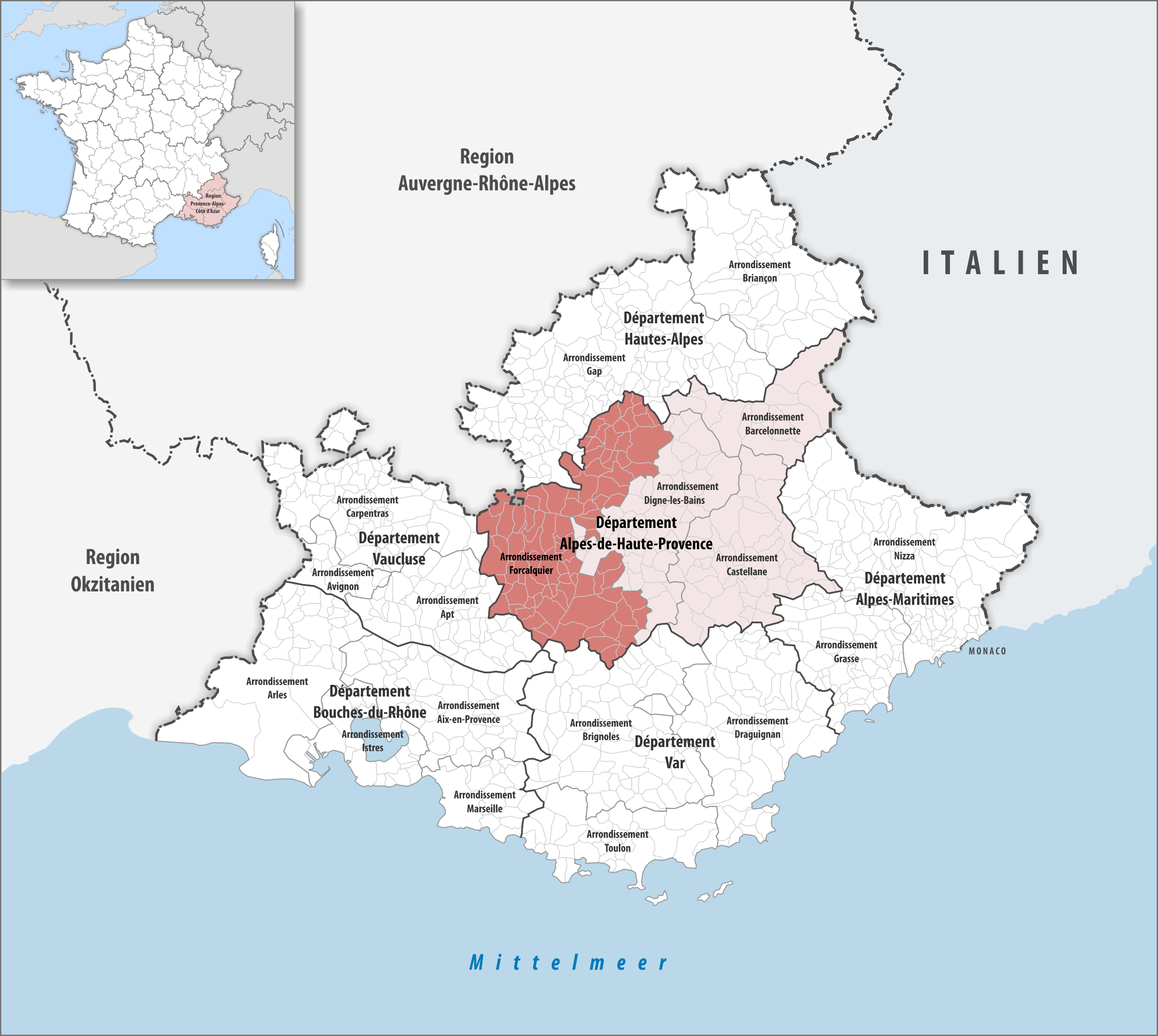 Lage des Arrondissements Forcalquier